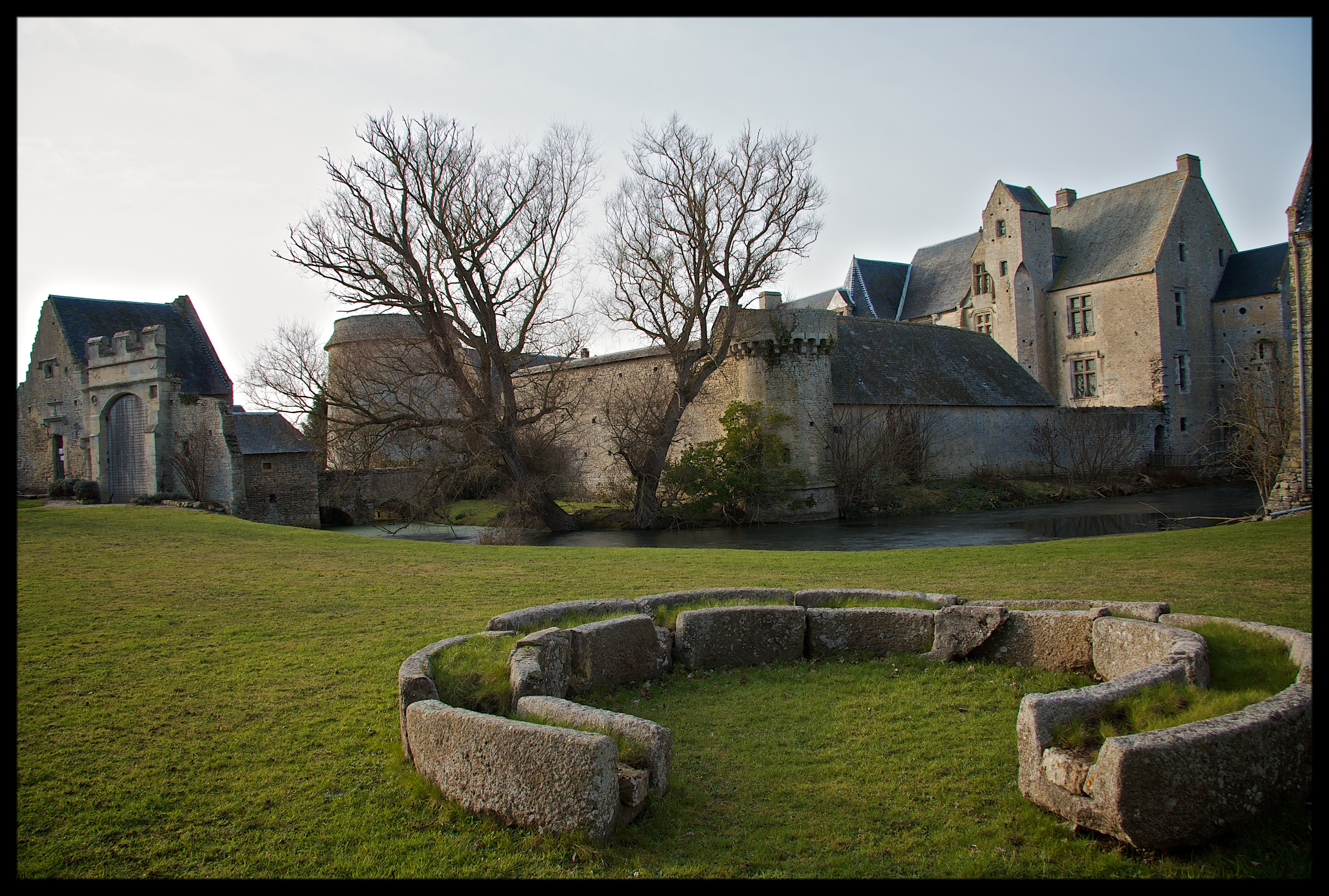 Le Manoir d'Argouges à Vaux-sur-Aure, Calvados, France